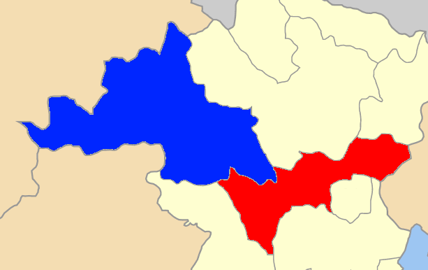 Χάρτης των ενοτήτων (και πρώην δήμων) από τις οποίες αποτελείται ο Δήμος Ξάνθης